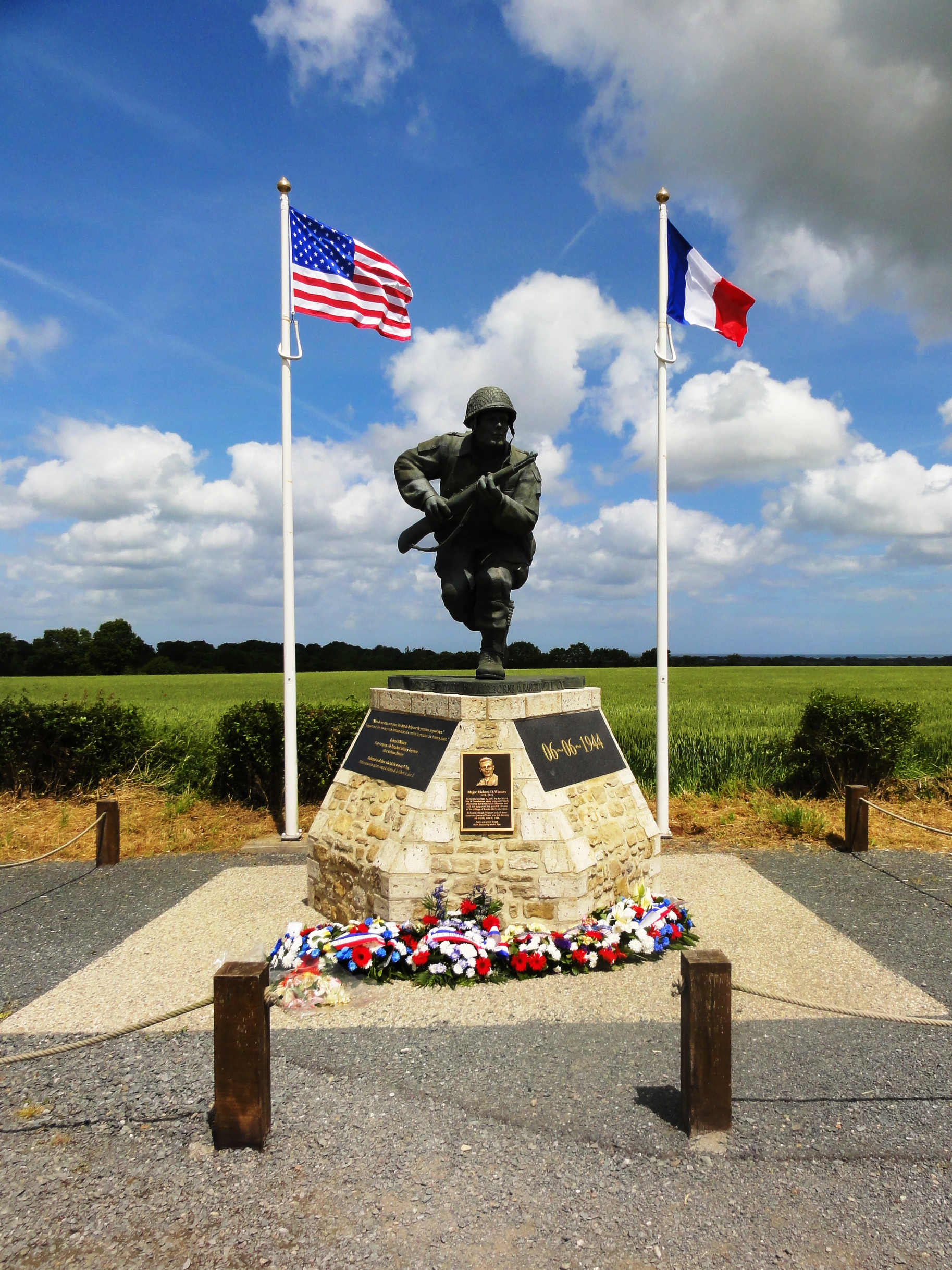 אנדרטה לזכר וינטרס בנורמנדי